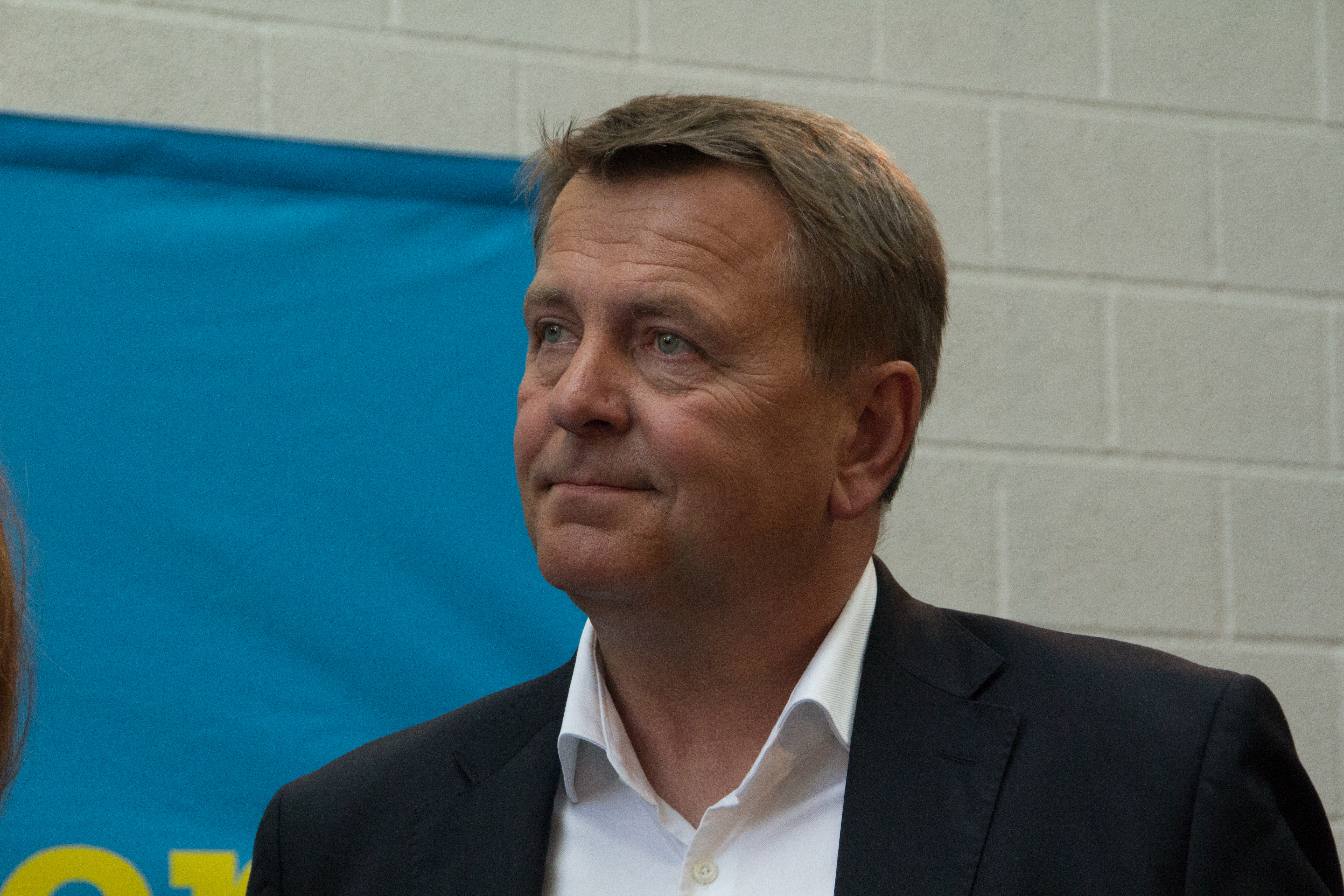 Christof Rasche (FDP) am Wahlabend der NRW Landtagswahl am 14. Mai 2017 in Düsseldorf